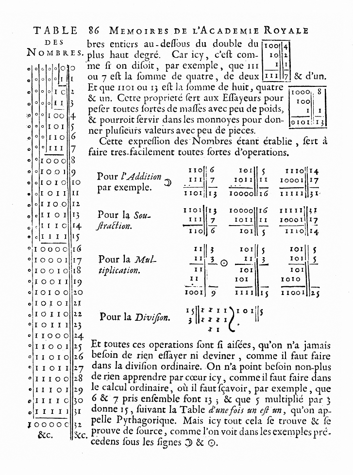 Page of the Article "Explication de l'Arithmétique Binaire", 1703/1705